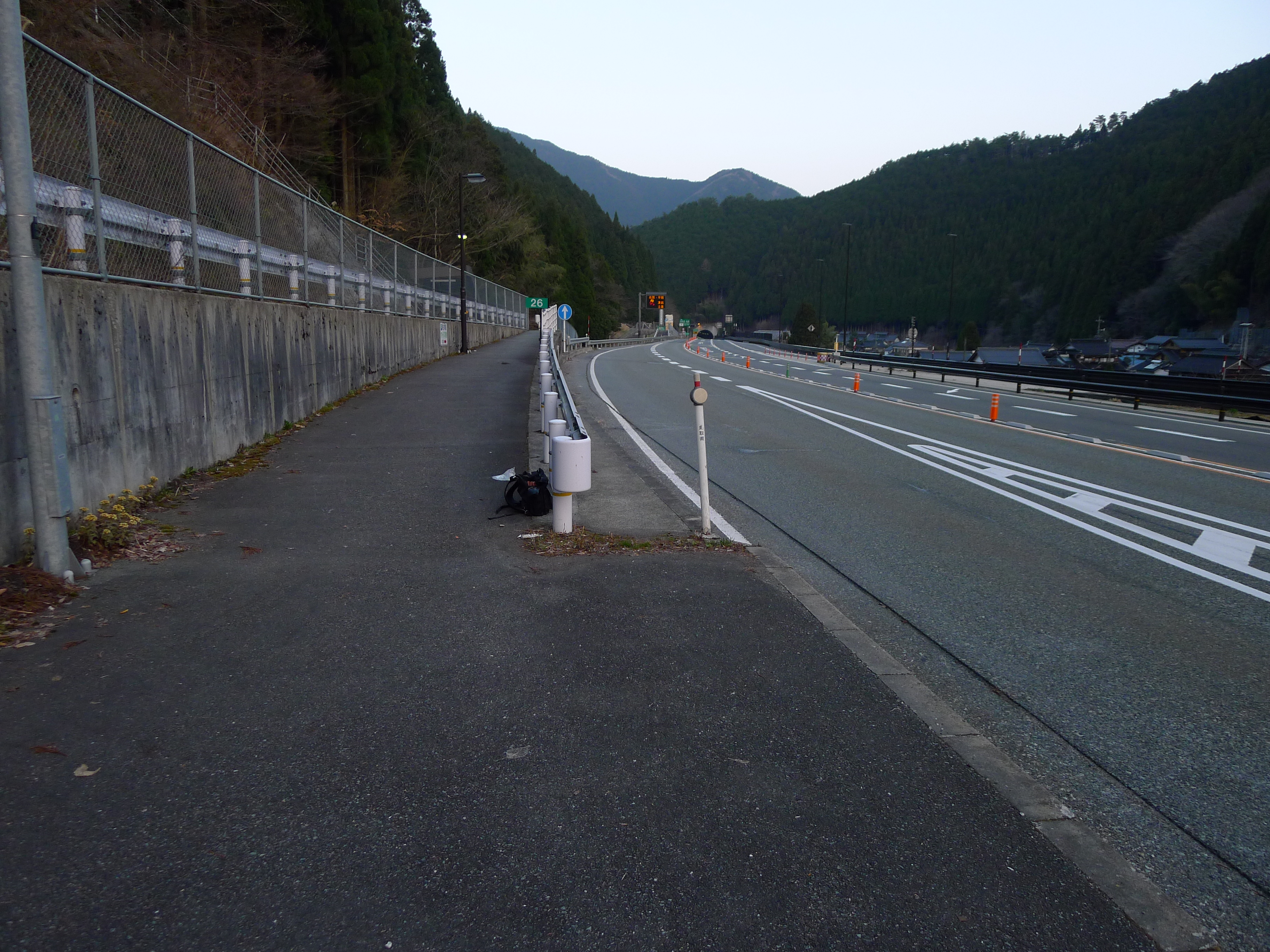 鳥取自動車道（国道373号自動車専用道路）に設置された智頭福原高速バス停留所（下り車線）